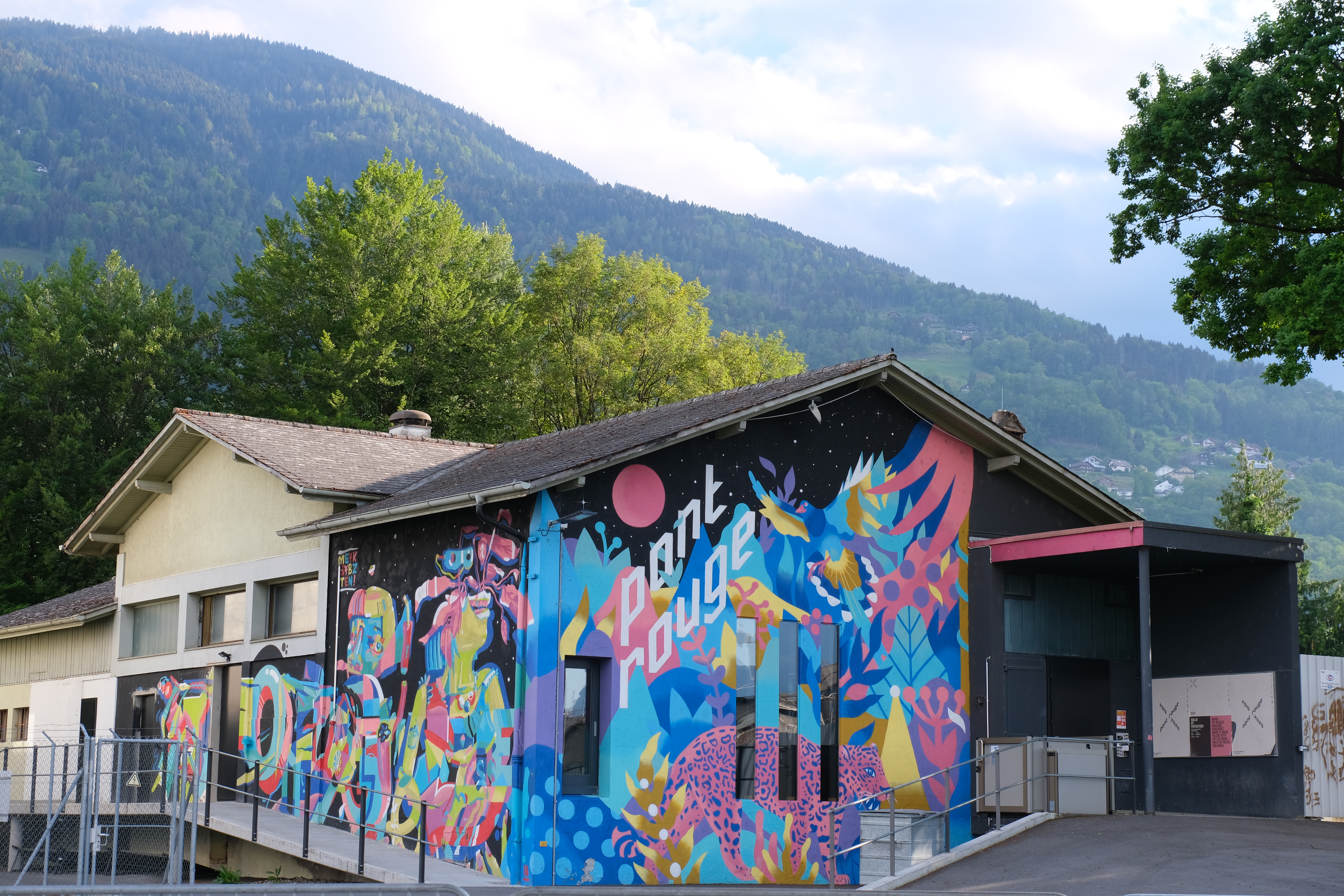 Le Pont Rouge à Monthey en 2020.